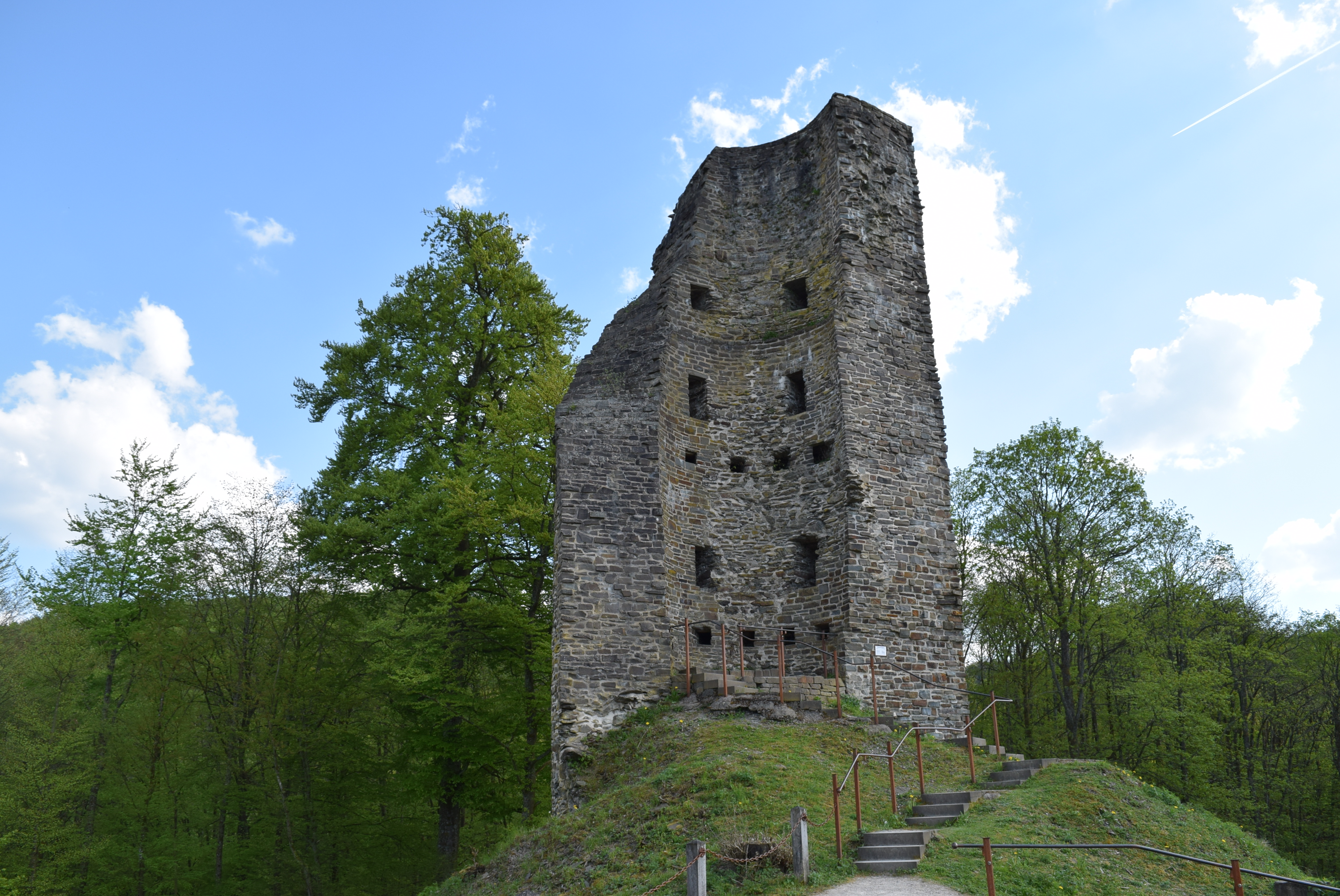 Reste vom Turm